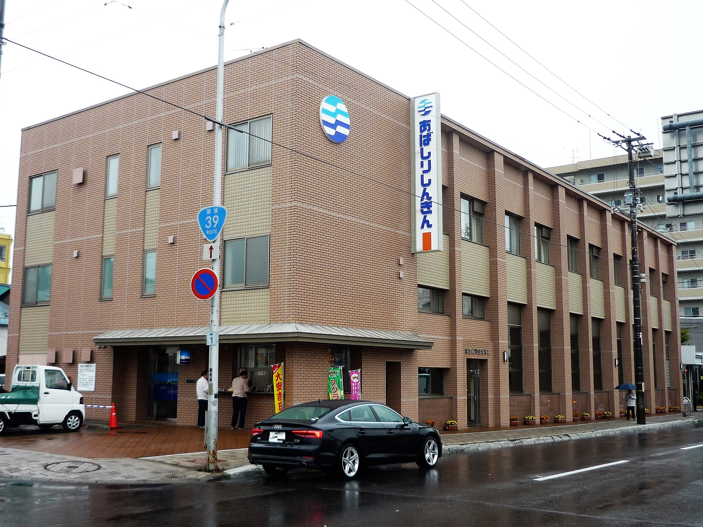 網走信用金庫本店（北海道網走市）